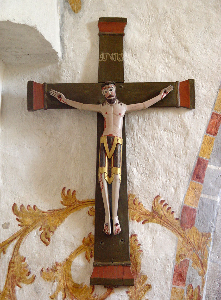 Bro kyrka (Gotland). Triumphkruzifix (um 1200)